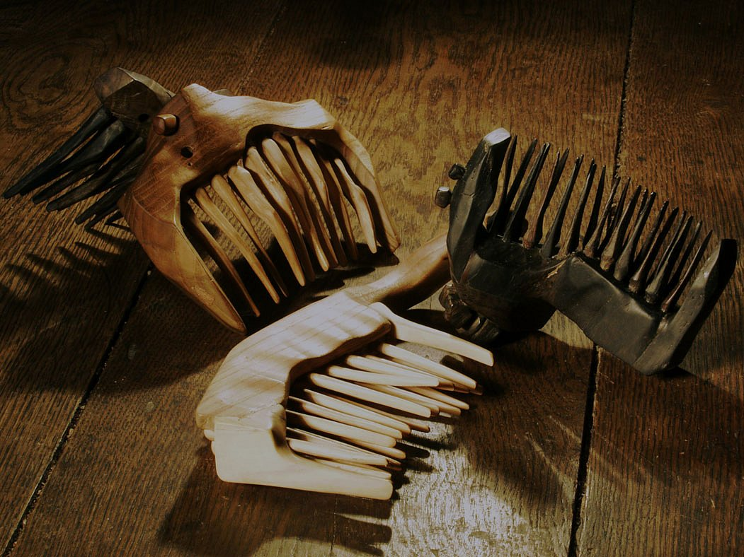 Три деревянных гребня